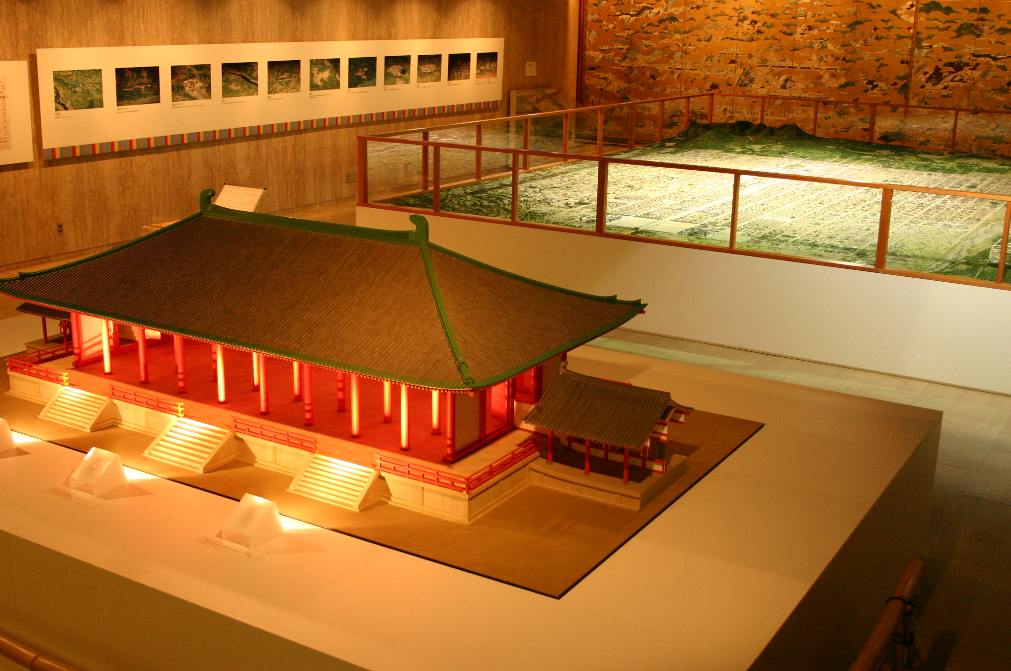 Burakudenhukugenmokei